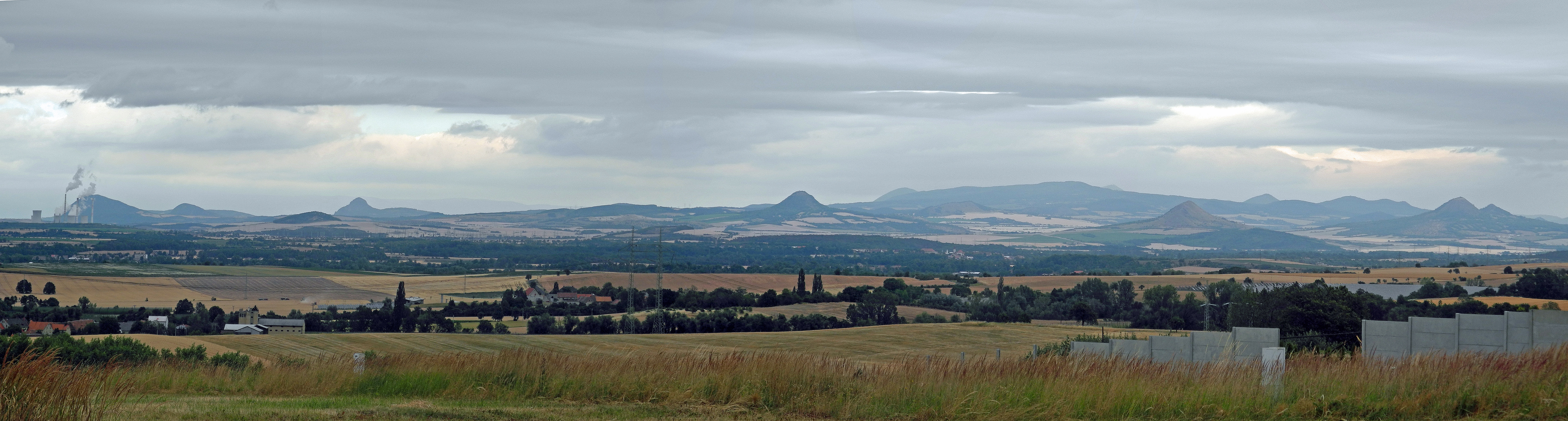 Blick von Litschkau (Líčkov) zum Böhmischen Mittelgebirge (České středohoří). Folgende Berge sind zu erkennen (von links nach rechts): Schladnig - Zlatník (522m, davor das Kraftwerk Počerady), Sellnitzer Berg - Želenický vrch (456 m), Borschen - Bořeň (539 m), Millayer Berg - Milá (510 m), Radelstein - Hradišťany (752 m), Milleschauer - Milešovka (836 m), Rannayer Berg - Raná (457 m), Hora - Lipská hora (688 m), Hoblik - Oblík (509 m).